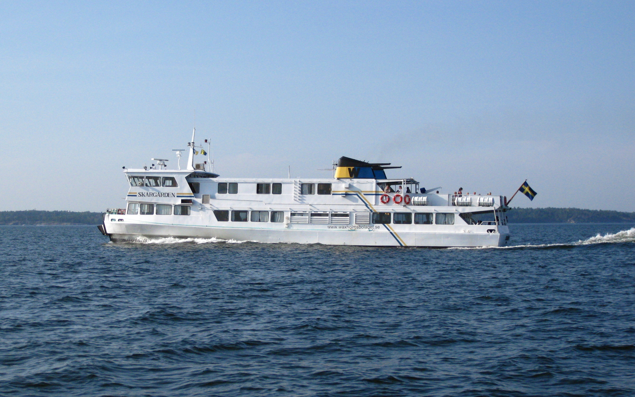 Waxholmsbolagets fartyg M/S Skärgården på väg över Jungfrufjärden.